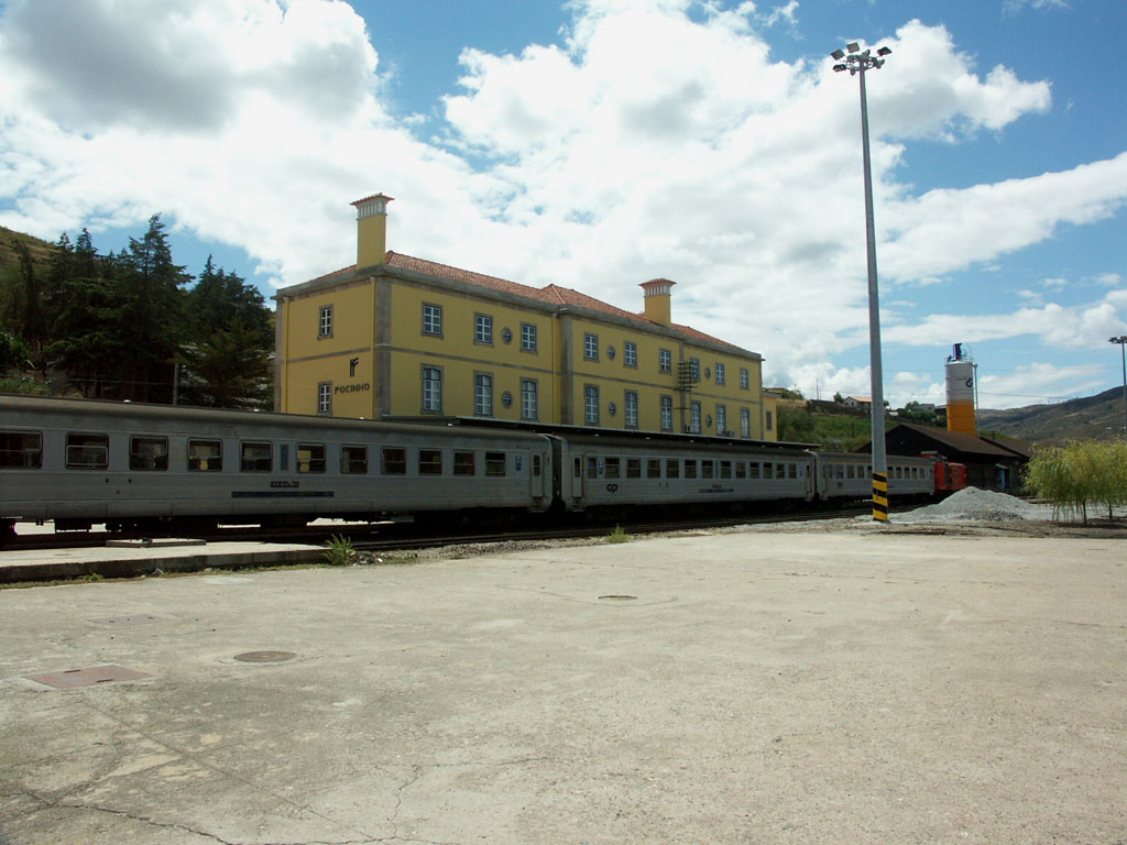 com o comboio das 13h46 e do regresso ao Porto. Tipo: E Estação Local: Pocinho Linha do Douro, PK 171 Data e hora: 19 de Agosto de 2006 13h33 Tipo: Comboio InterRegional 960 Pocinho - Porto • Campanhã Material: Locomotiva 1411 + 5 carruagens Sorefame